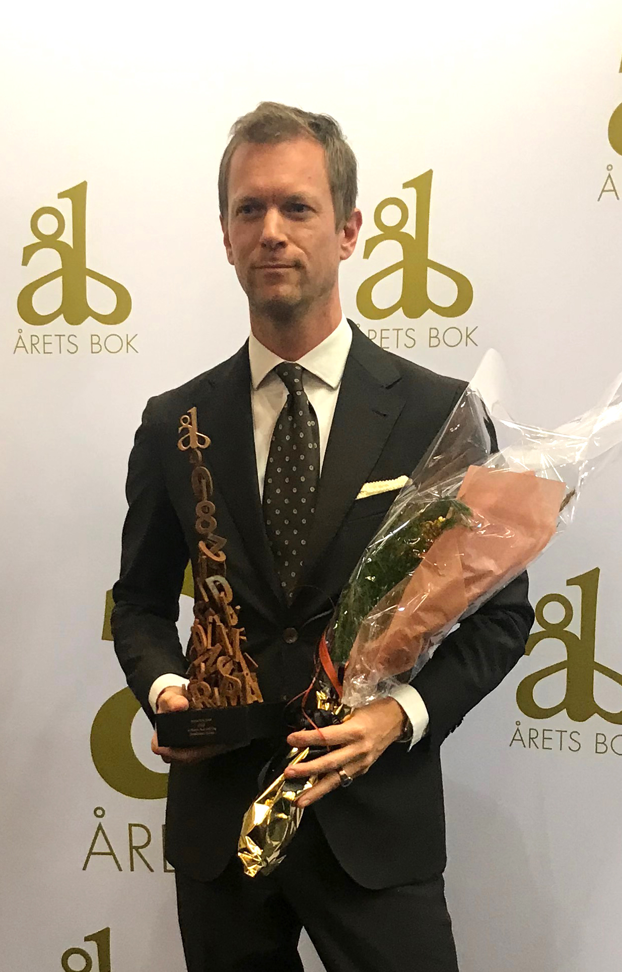 Niklas Natt och Dag, vinnare av Årets Bok 2018